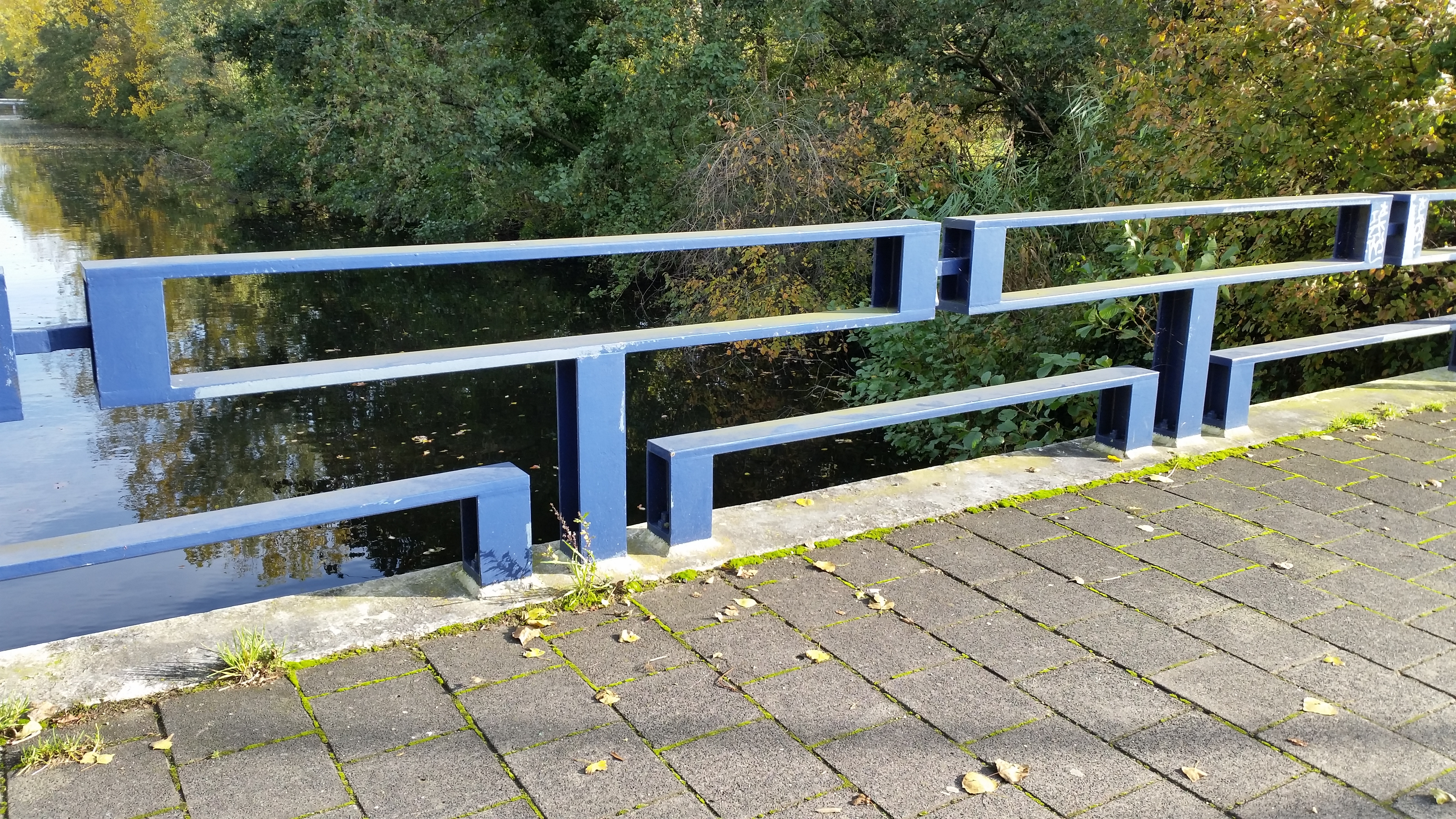 Leuning van Brug 811 (in Amsterdam)